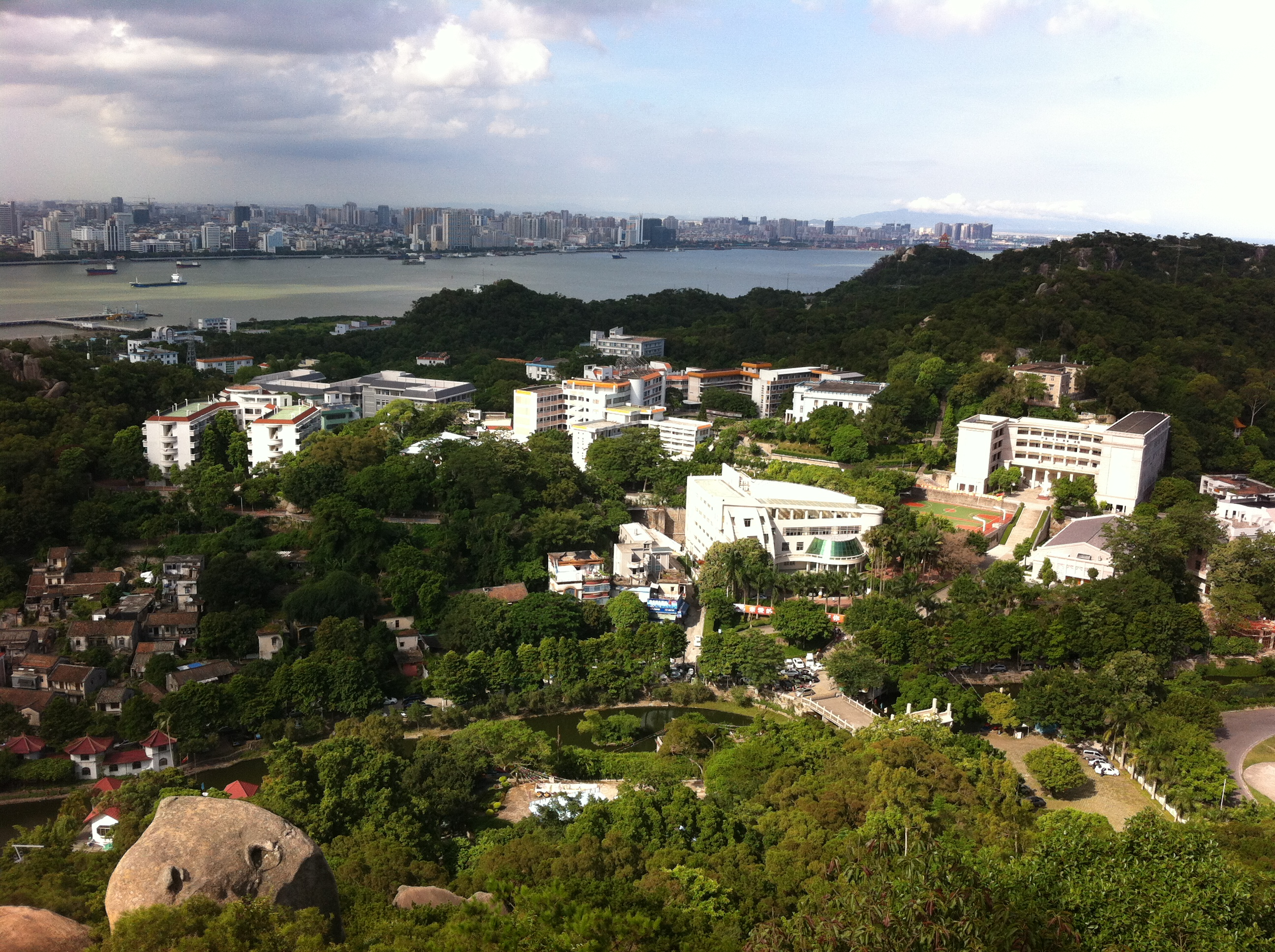 粵語: 廣東汕頭礐石